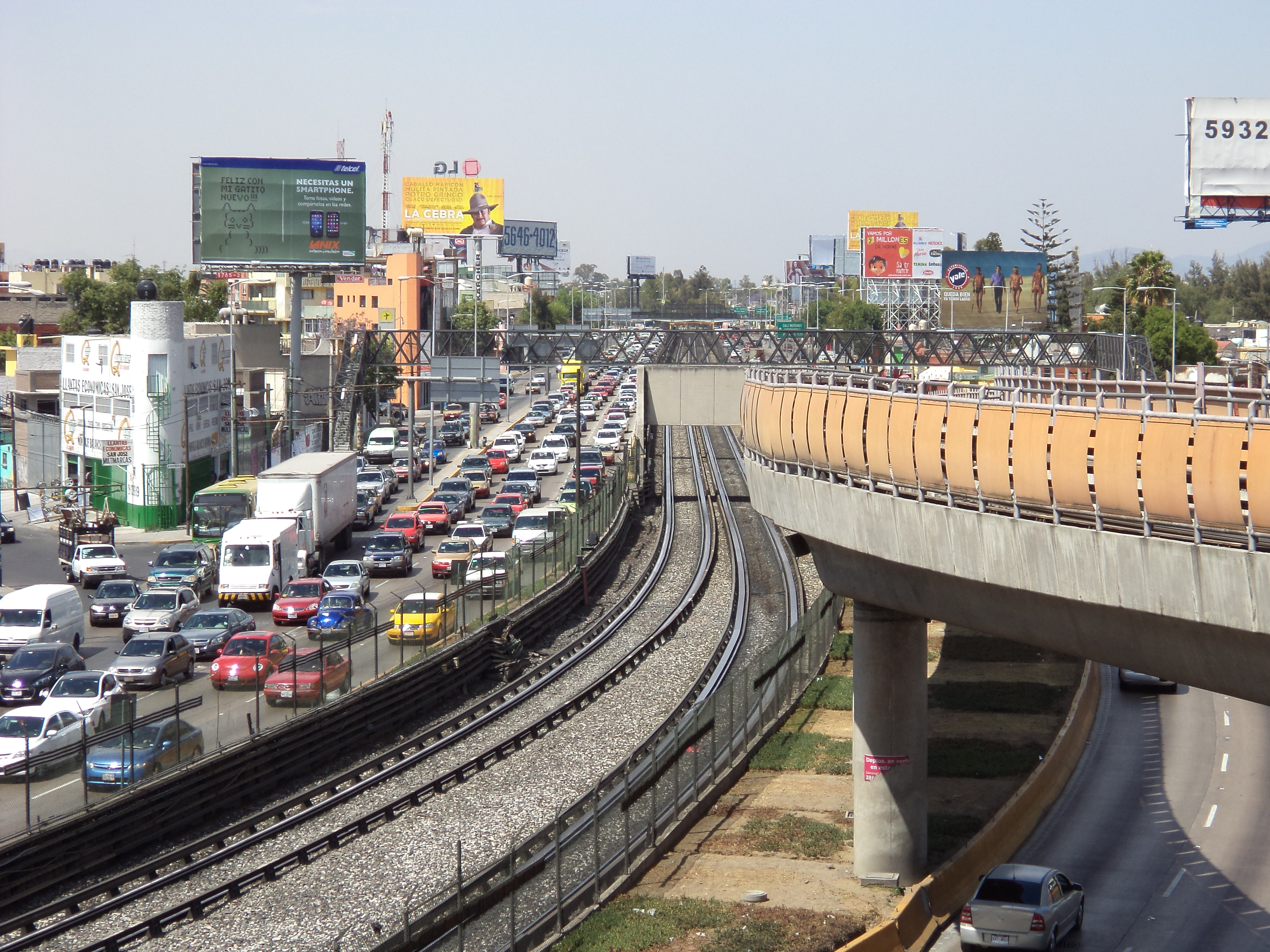 Via de servicio en oceania linea 5-B